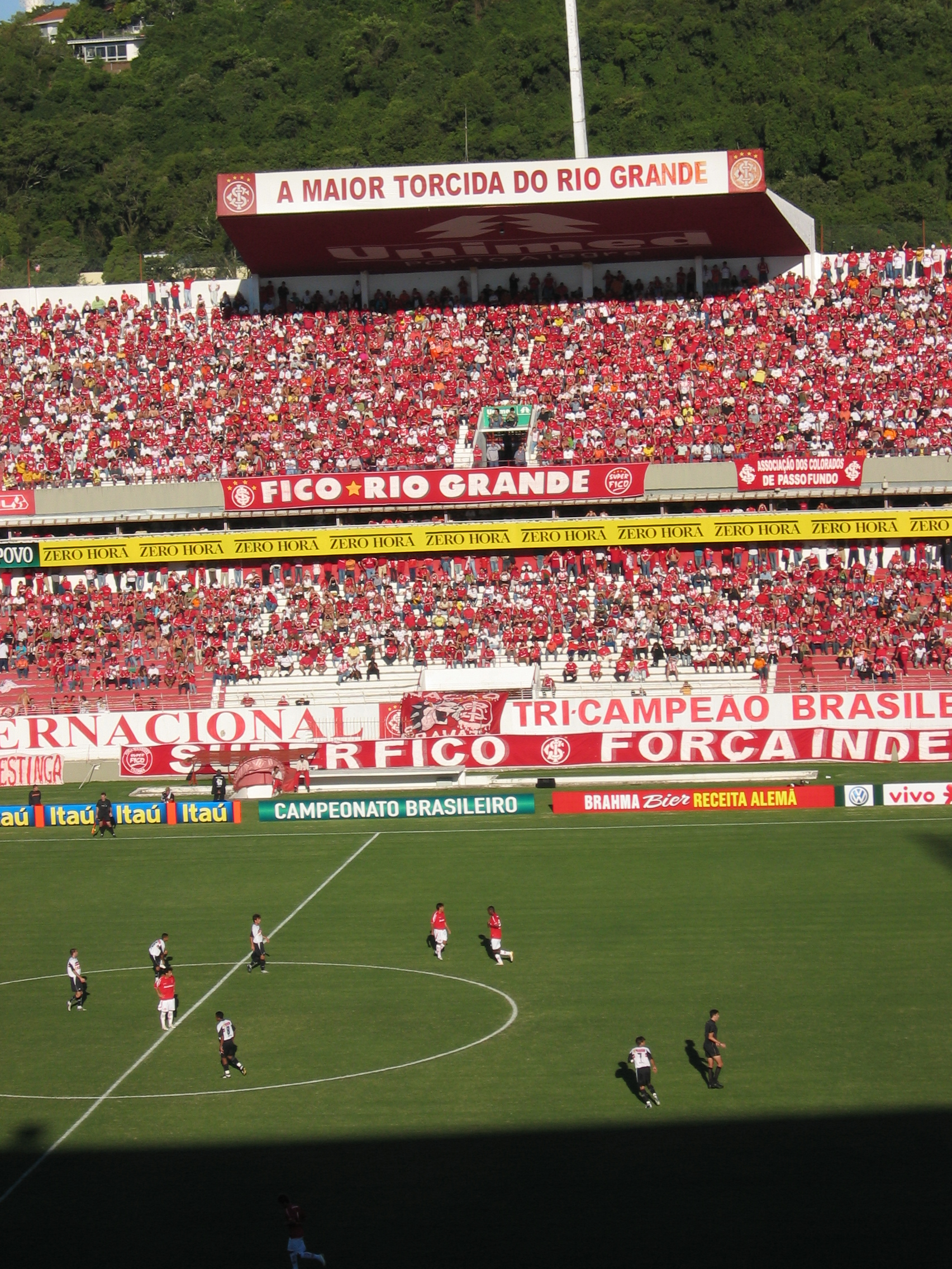 Estádio Beira-Rio, Porto Alegre SC Internacional playing Santa Cruz FC (1-0)